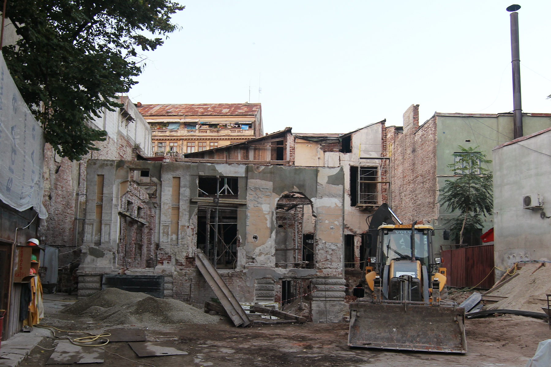 Casă pe strada Franceză, vedere din spate